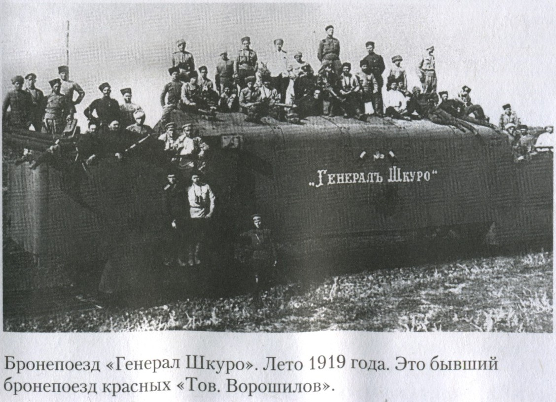 Бронепоезд «Генерал Шкуро» с командой. Лето 1919 года